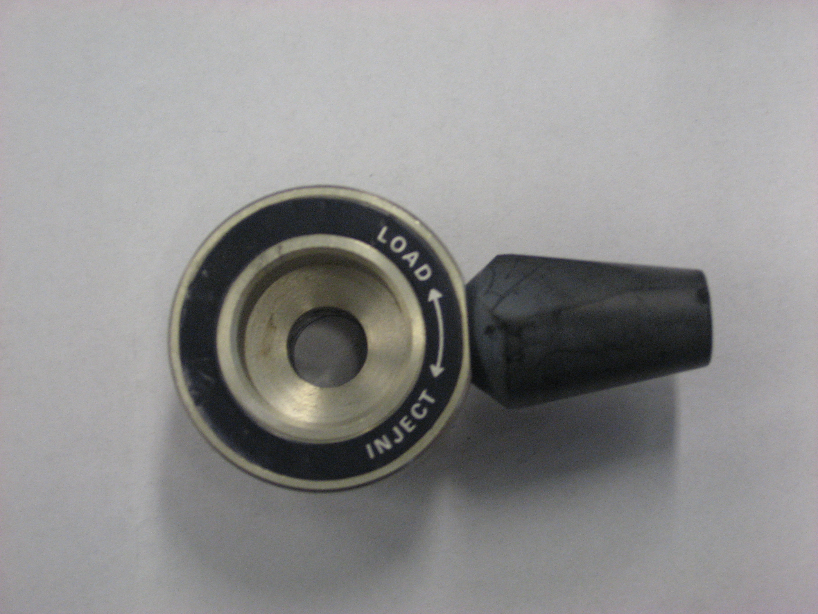 Losse knop van de 6-poort ventiel